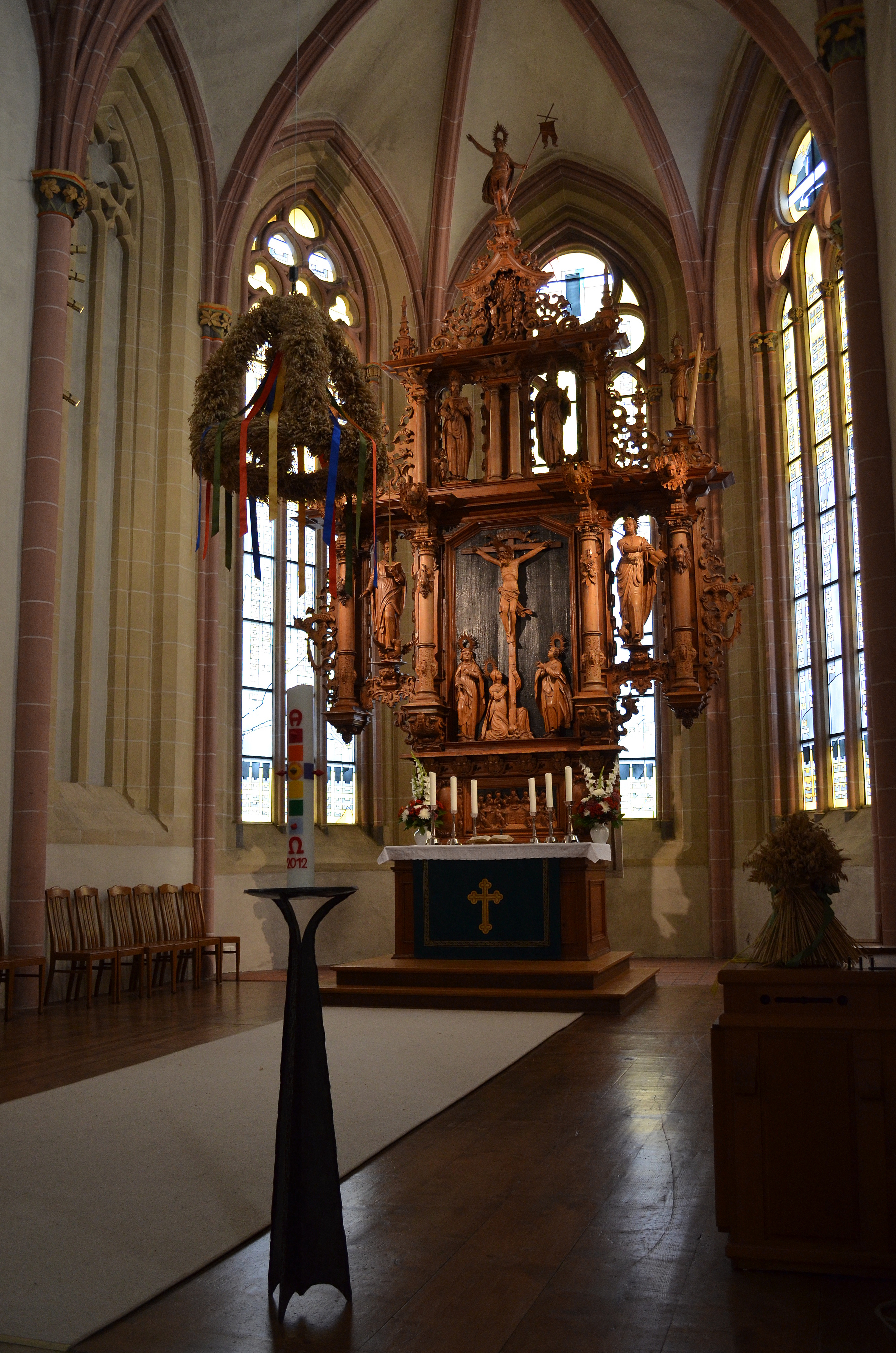 Goslar Marktkerk Cosmas en Damianus barok Hoofdaltaar (1659)